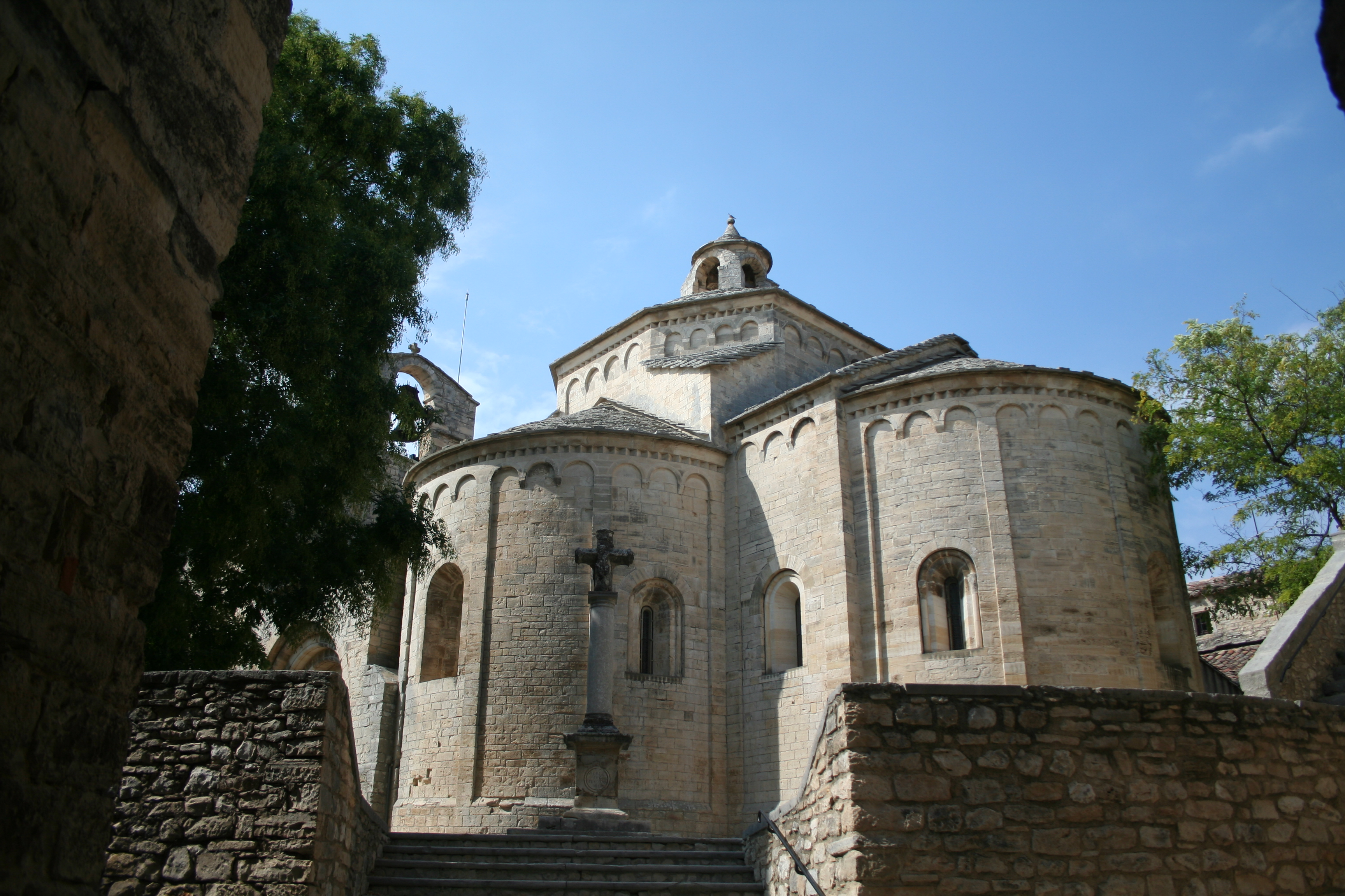 Saint-Martin-de-Londres (Hérault) - Église romane (chevet).